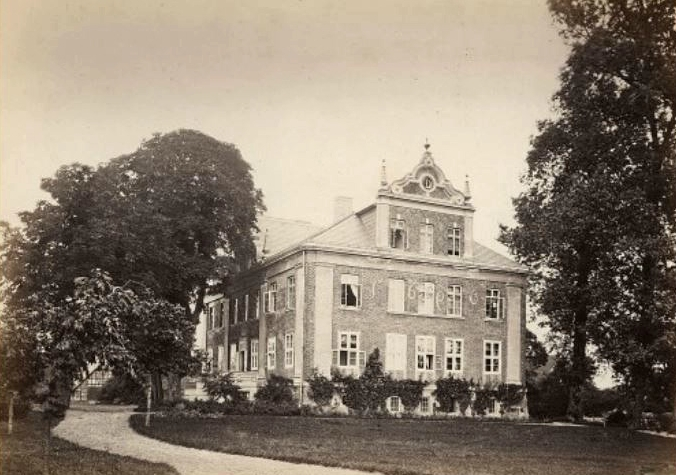 Herrenhaus Goldenbow im Jahr 1861